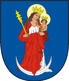 Znak města Paskov